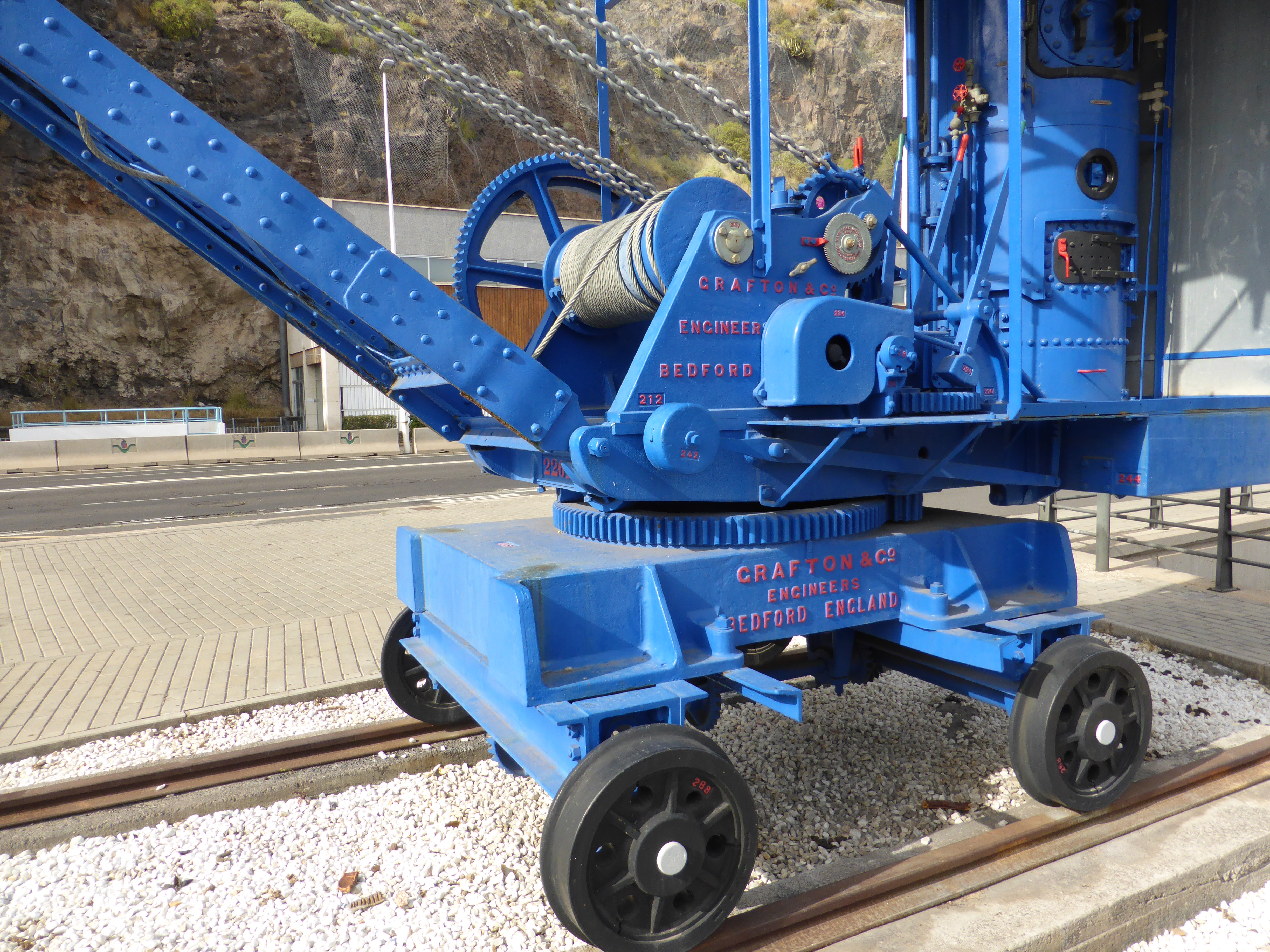 Frente a la Escuela de Náutica de Santa Cruz de Tenerife (Canarias, España), la Autoridad Portuaria conserva esta grúa móvil de vapor, fabricada en Bedford (Inglaterra), por "Grafton & Co. Engineers", hacia el año 1920. Ancho de vía: 2 metros. Carga: 2.000 kilos. Se utilizó en el muelle de Valleseco, hasta el año 1956, para cargar y descargar gabarras carboneras. Su estado de conservación es aparentemente bueno, pues está completa, aunque no está operativa.